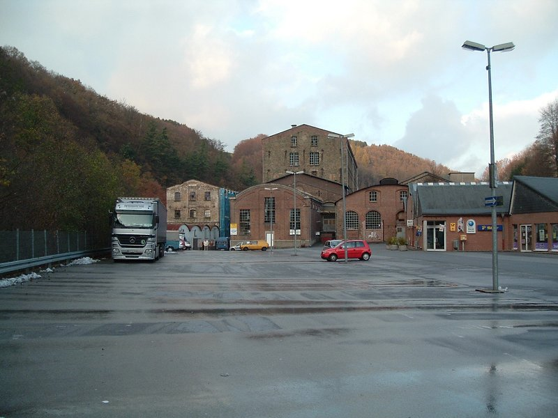 Blick vom Wuppermarkt in Vogelsmühle auf das Fabrikgelände Fotografiert von Benutzer:Taube Nuss im November 2004 "Lizenz:GNU FDL"